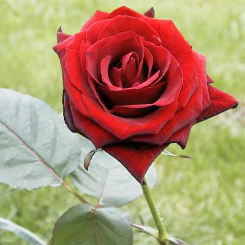 Rosa 'Baccara'